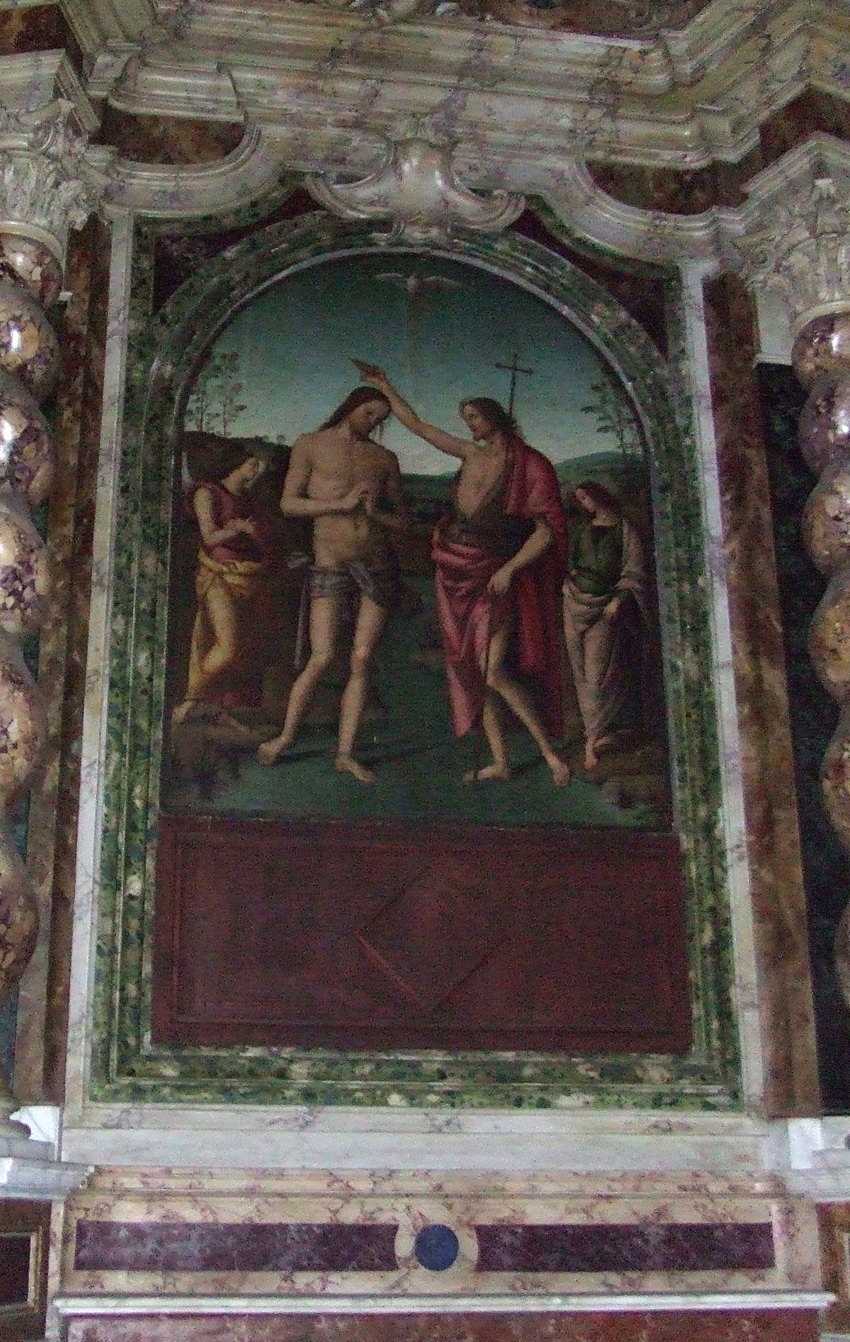 Photographie du Baptême du Christ du Pérugin, Duomo de Città della Pieve (Ombrie - Italie)